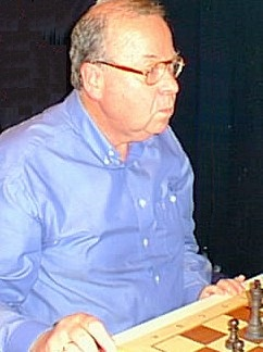 Wolfgang Uhlmann, 8. Weltmeisterschaft der Senioren vom 8. bis 21. November 1998 in Grieskirchen / Österreich.